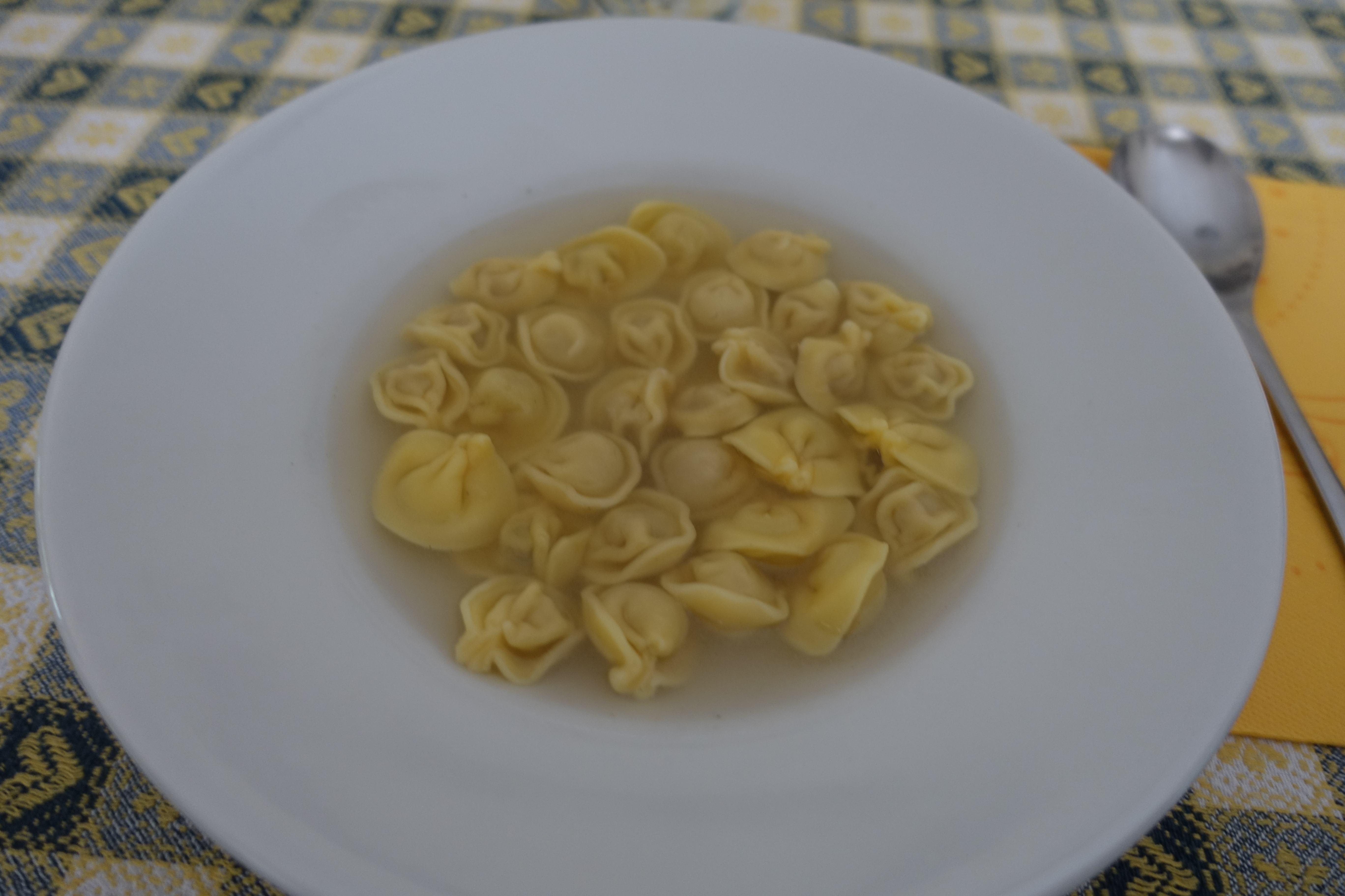 Tortellini en bouillon